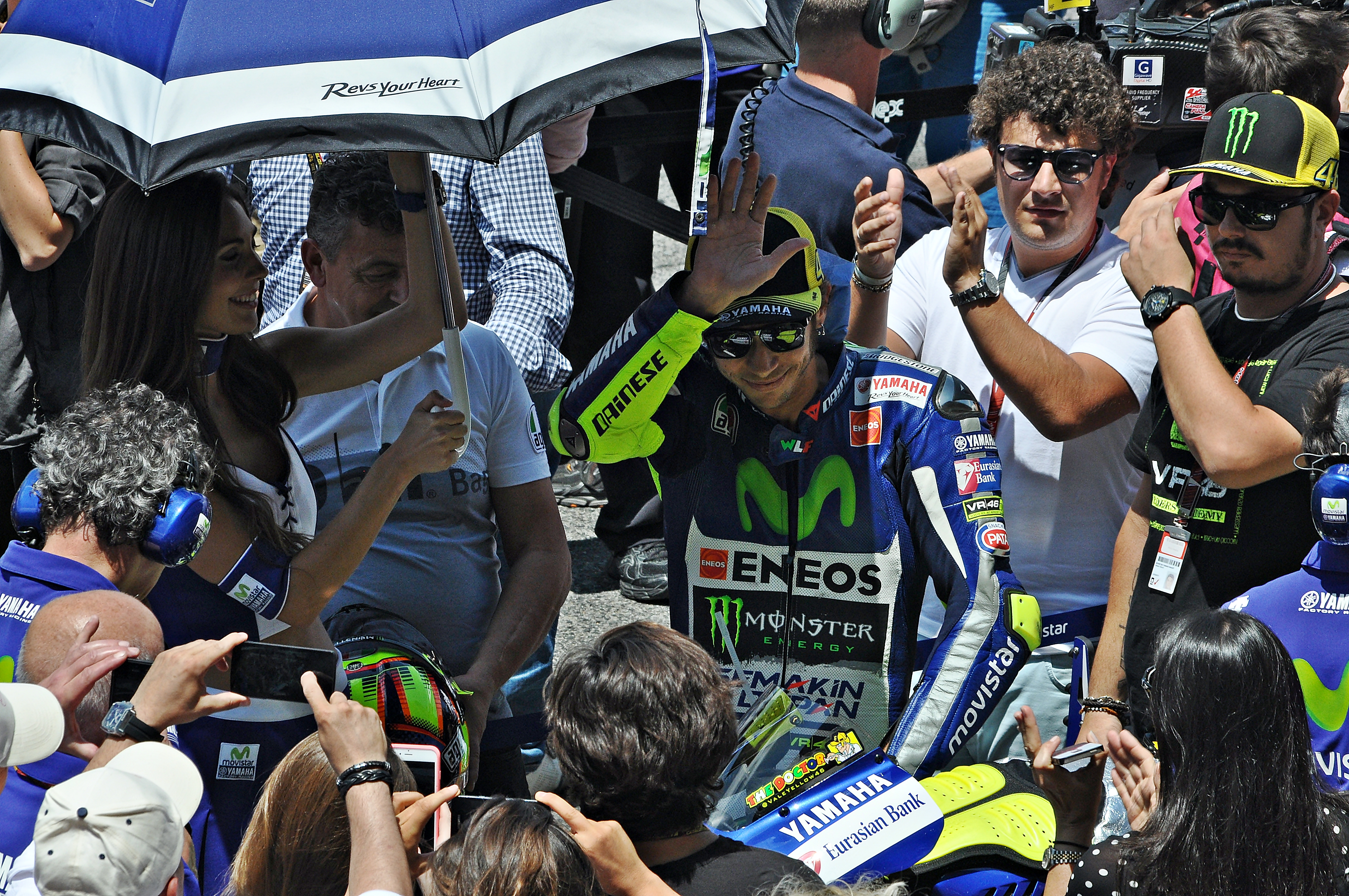 gran premio de cataluña